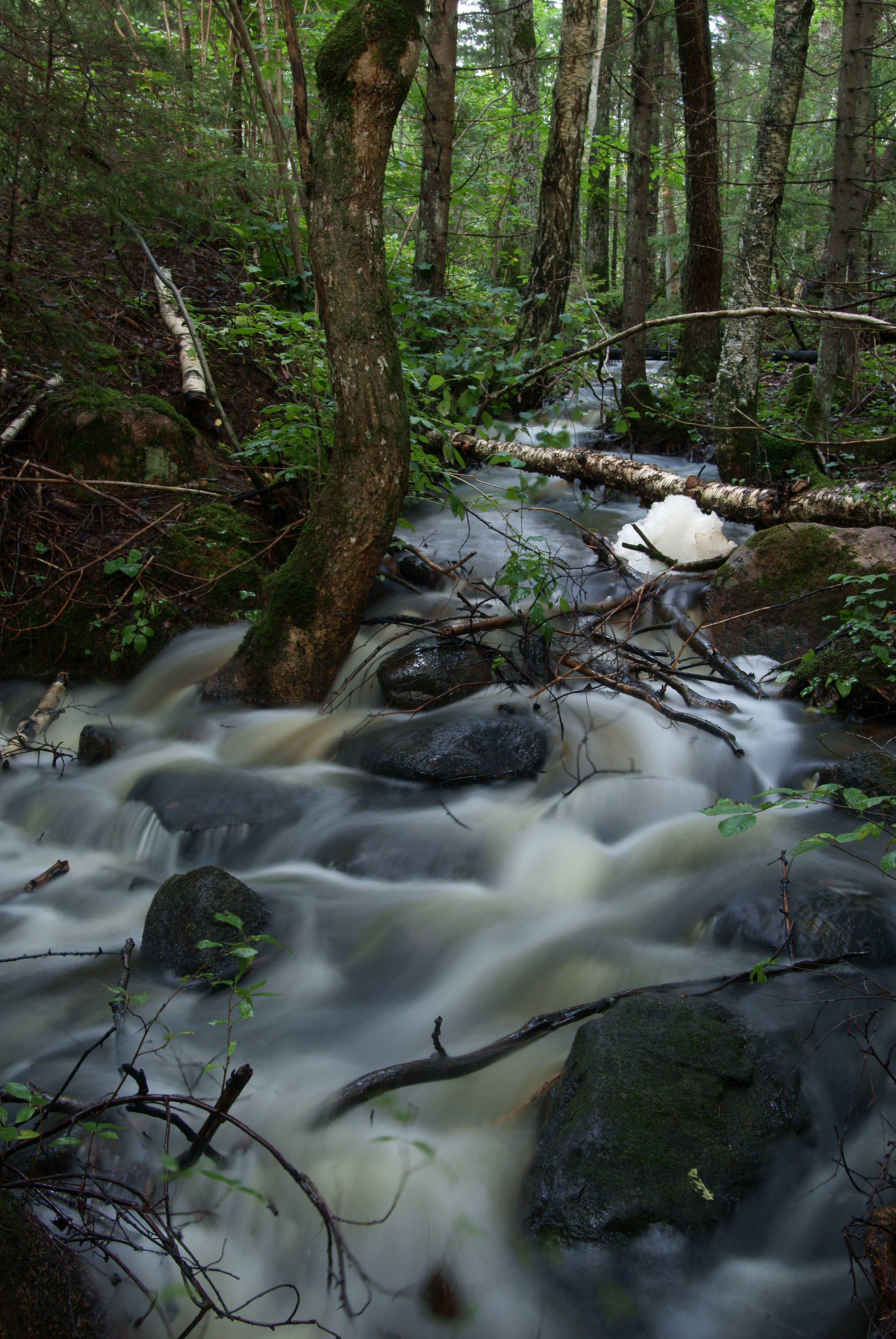 Pildistatud ühte neljast Nõmme kurisust Saaremaal. Nõmme kurisud kuuluvad Tuiu-Paka kurisude hulka, mis kõik on võetud looduskaitse alla.